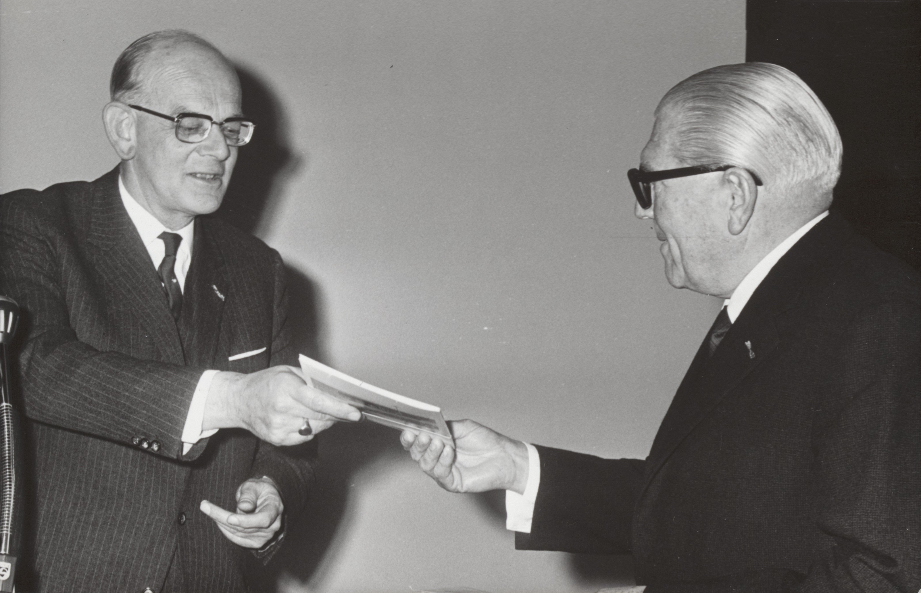 Collectie / Archief : Fotocollectie Elsevier Reportage / Serie : [ onbekend ] Beschrijving : David Roëllprijs 1968 uitgereikt aan prof. Van Eesteren in Rijksmuseum door prof.dr. De Gaay Fortman (links) Datum : 18 november 1968 Locatie : Amsterdam, Noord-Holland Trefwoorden : hoogleraren, prijsuitreikingen Persoonsnaam : Eesteren, Cor van, Gaay Fortman, W.F. de Fotograaf : Koch, Eric / Anefo Auteursrechthebbende : Nationaal Archief Materiaalsoort : Foto (zwart/wit) Nummer archiefinventaris : bekijk toegang 2.24.05.02 Bestanddeelnummer : 091-1086